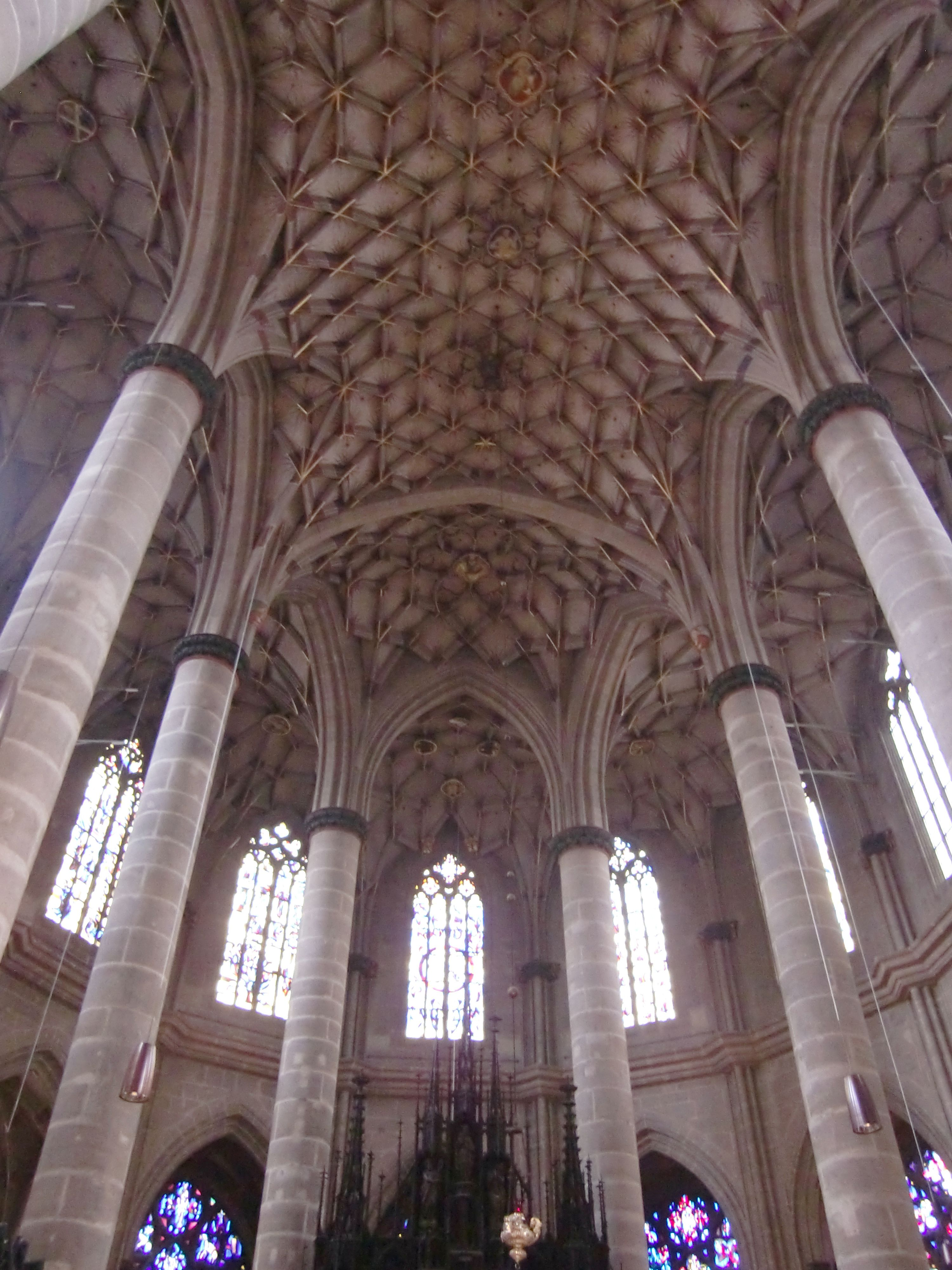 Heilig-Kreuz-Münster Schwäbisch Gmünd